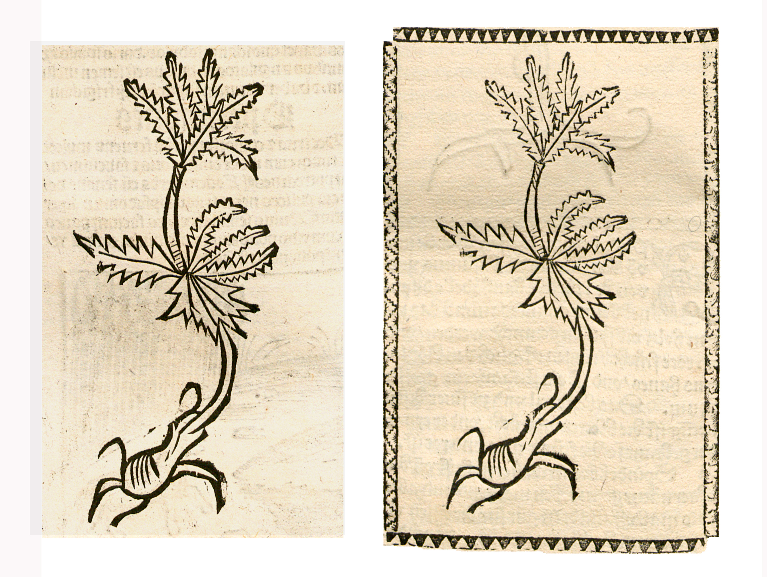 Abbildung vonː Tormentill (Potentilla erecta)